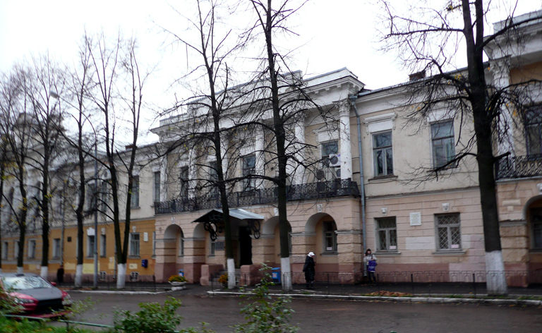 Главное здание Ярославского пединститута: улица Республиканская, 108 / улица Салтыкова-Щедрина, 1, Ярославль, Ярославская область